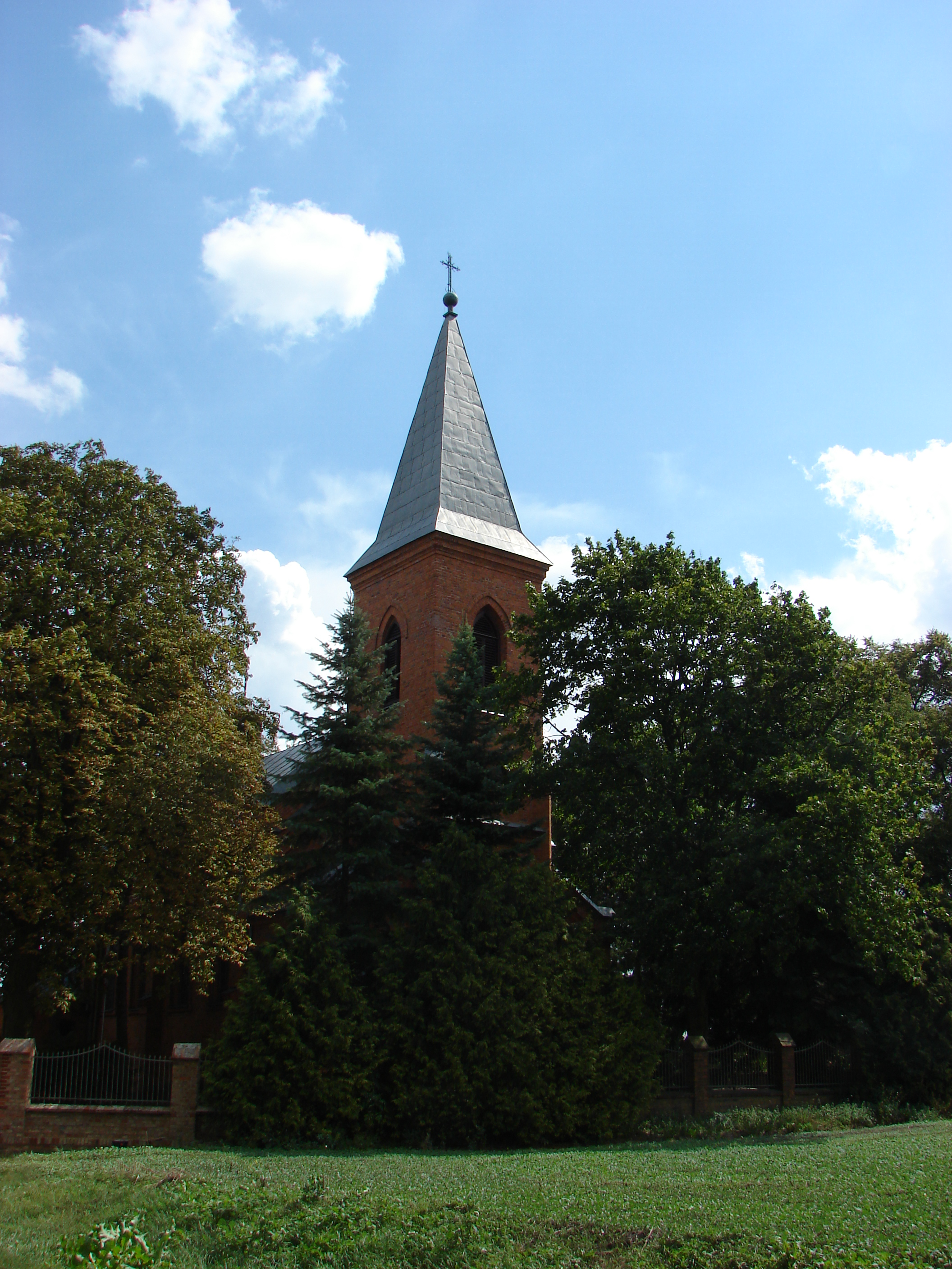 Kłobia, zespół kościoła par. pw. św. Wojciecha